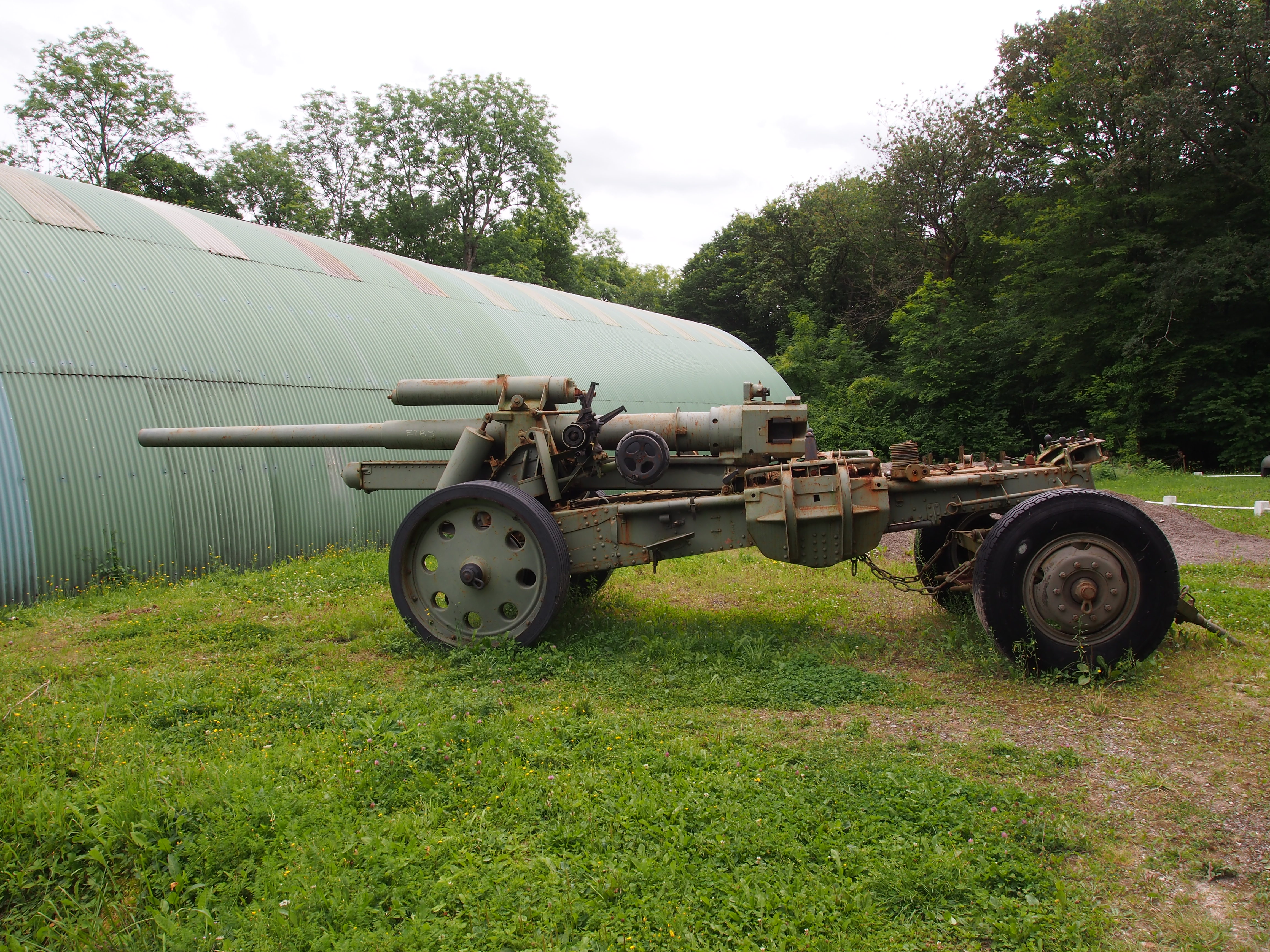 Fort de Fermont and its museum - Ouvrage Fermont AAA